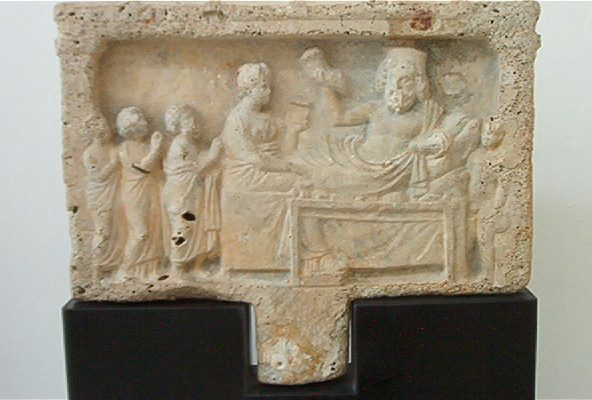 Ex-voto en relief grec, des fouilles de Mahdia au musée du Bardo: Asclépios et Hygieia recevant des offrandes.